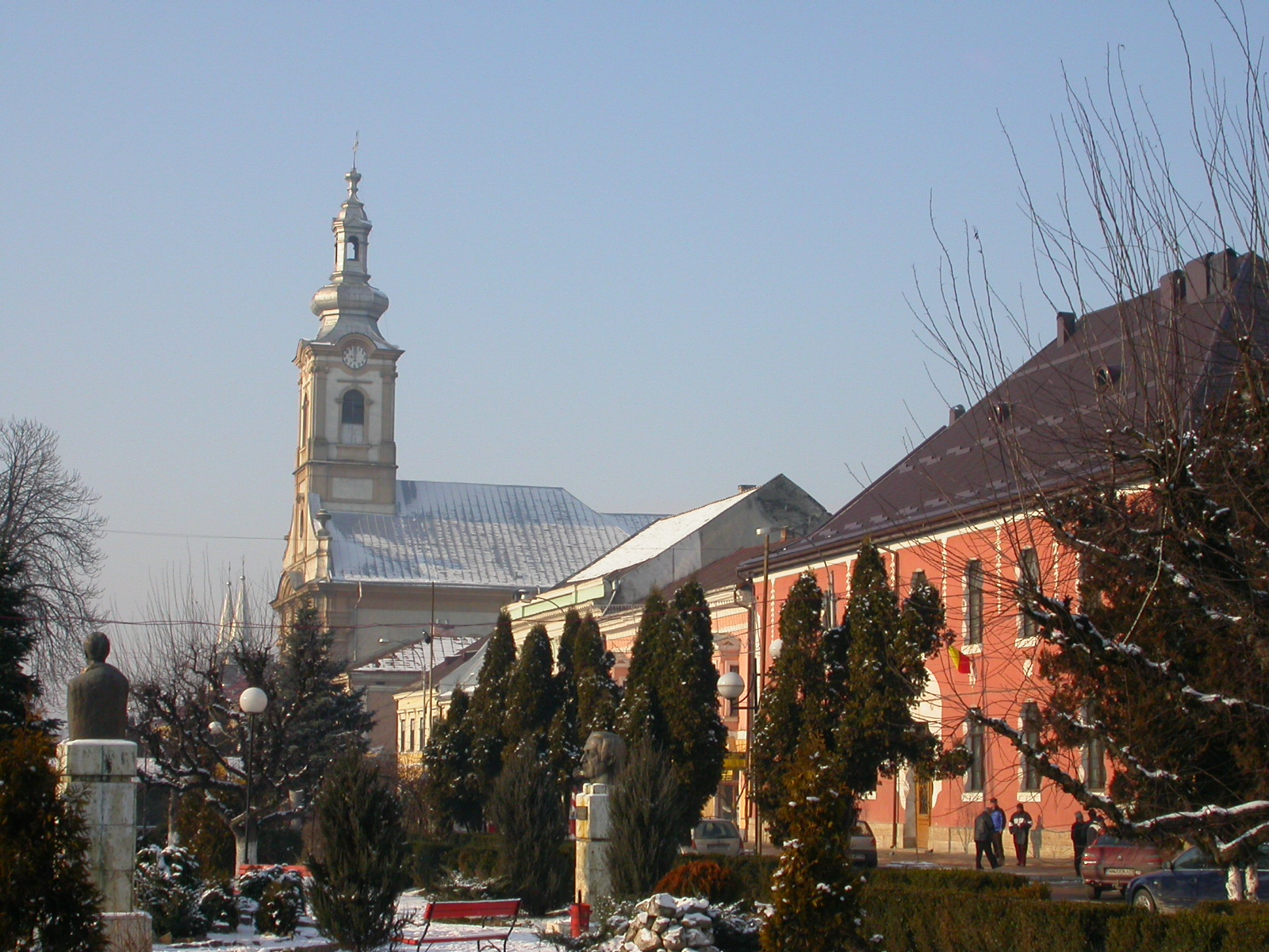 Centrul istoric al orașului Sighetu Marmației, sec. XVIII-XX.